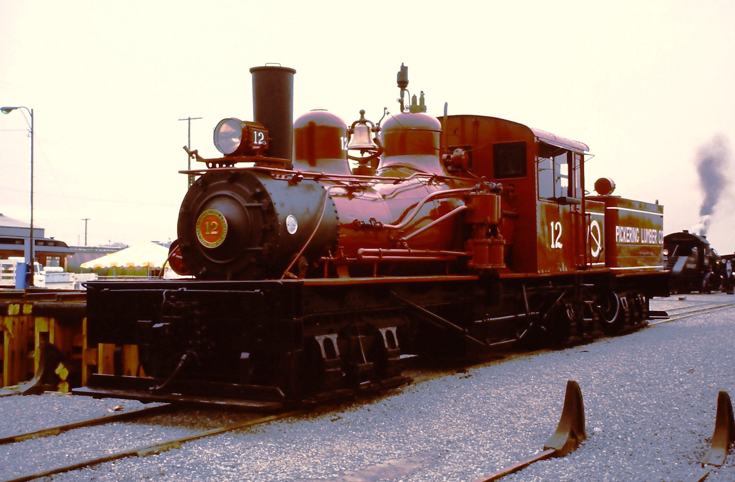 Pickerung Lumber Co Nummer 12 auf der SteamExpo 86 in Vancouver